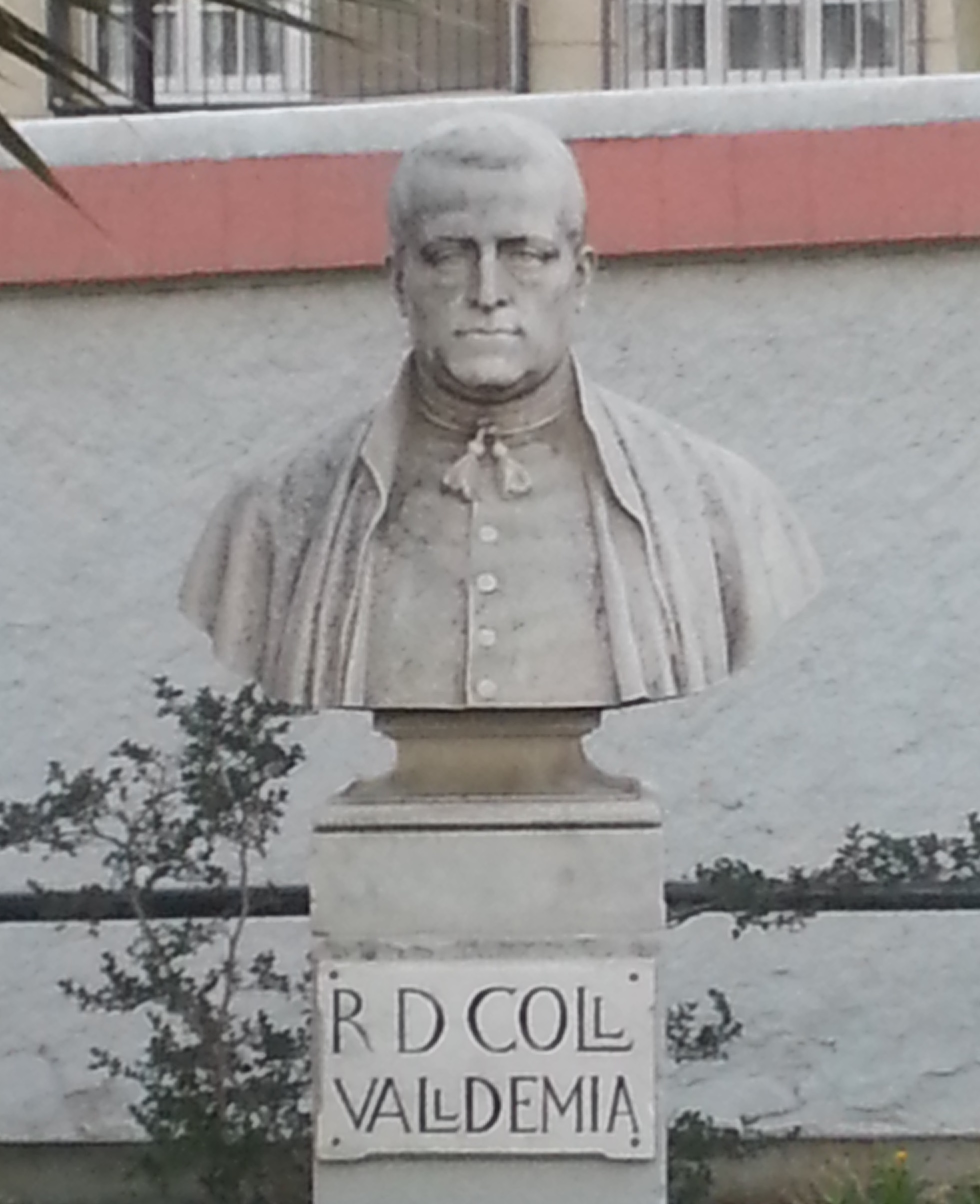 Bust d'Ermengol Coll de Valldemia i Grau, fundador del col·legi Maristes Valldemia de Mataró (Catalunya) al pati de l'escola.